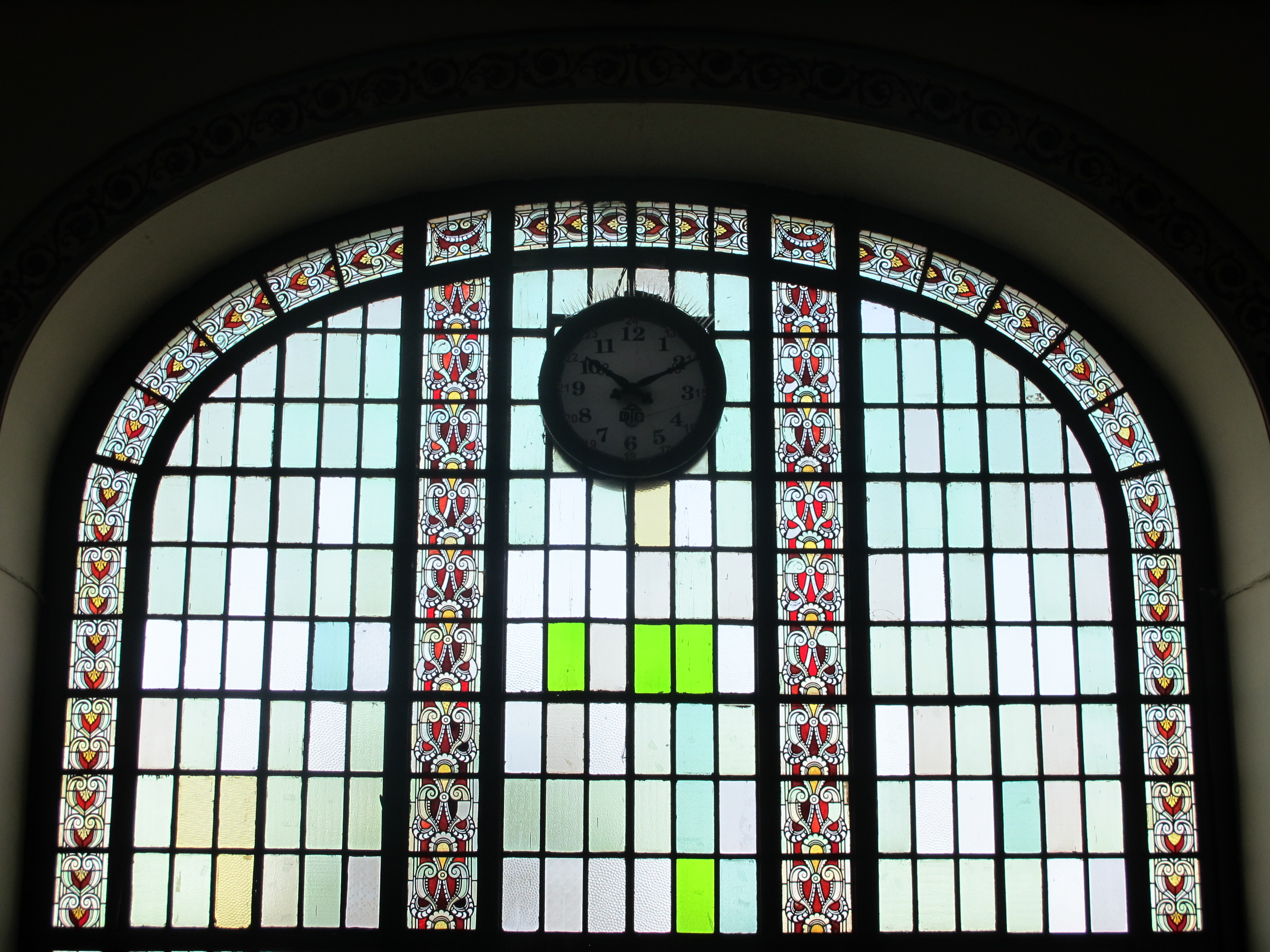 Fenster im Istanbuler Bahnhof Haydarpaşa